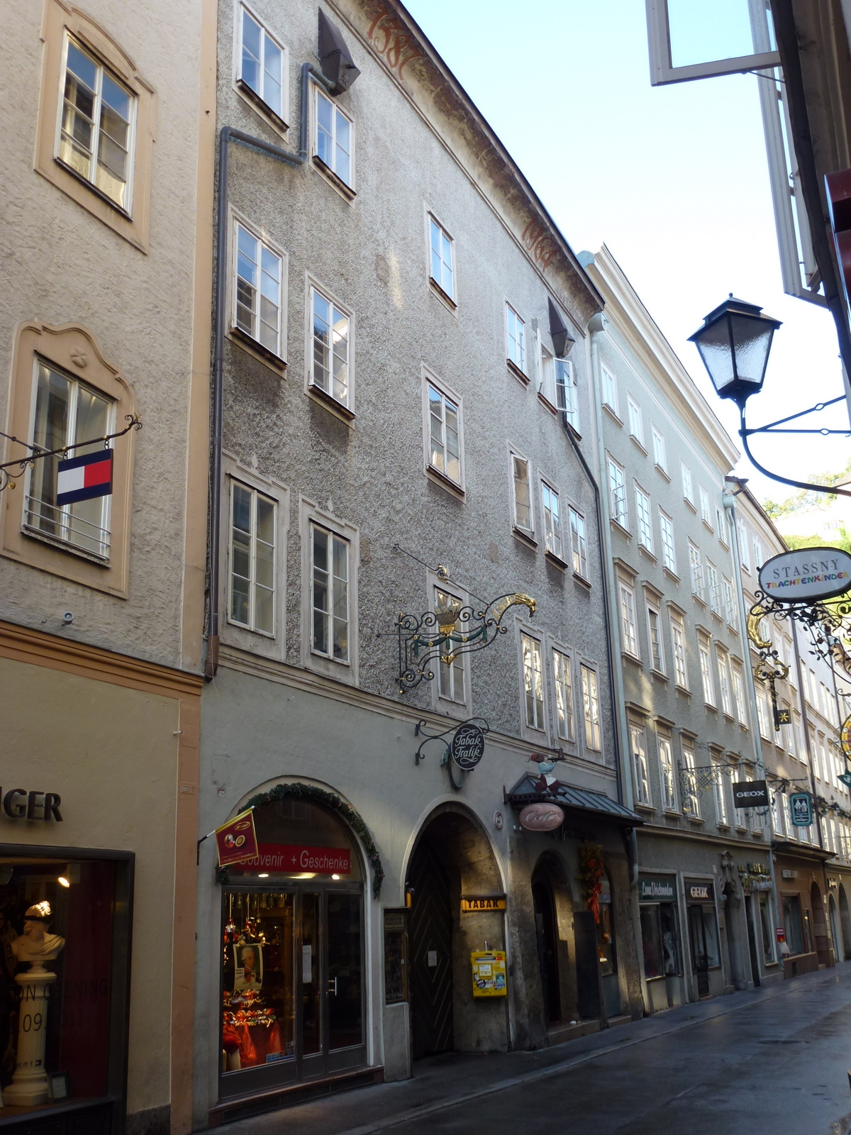 Bürgerhaus, Baron Lassberg-Haus